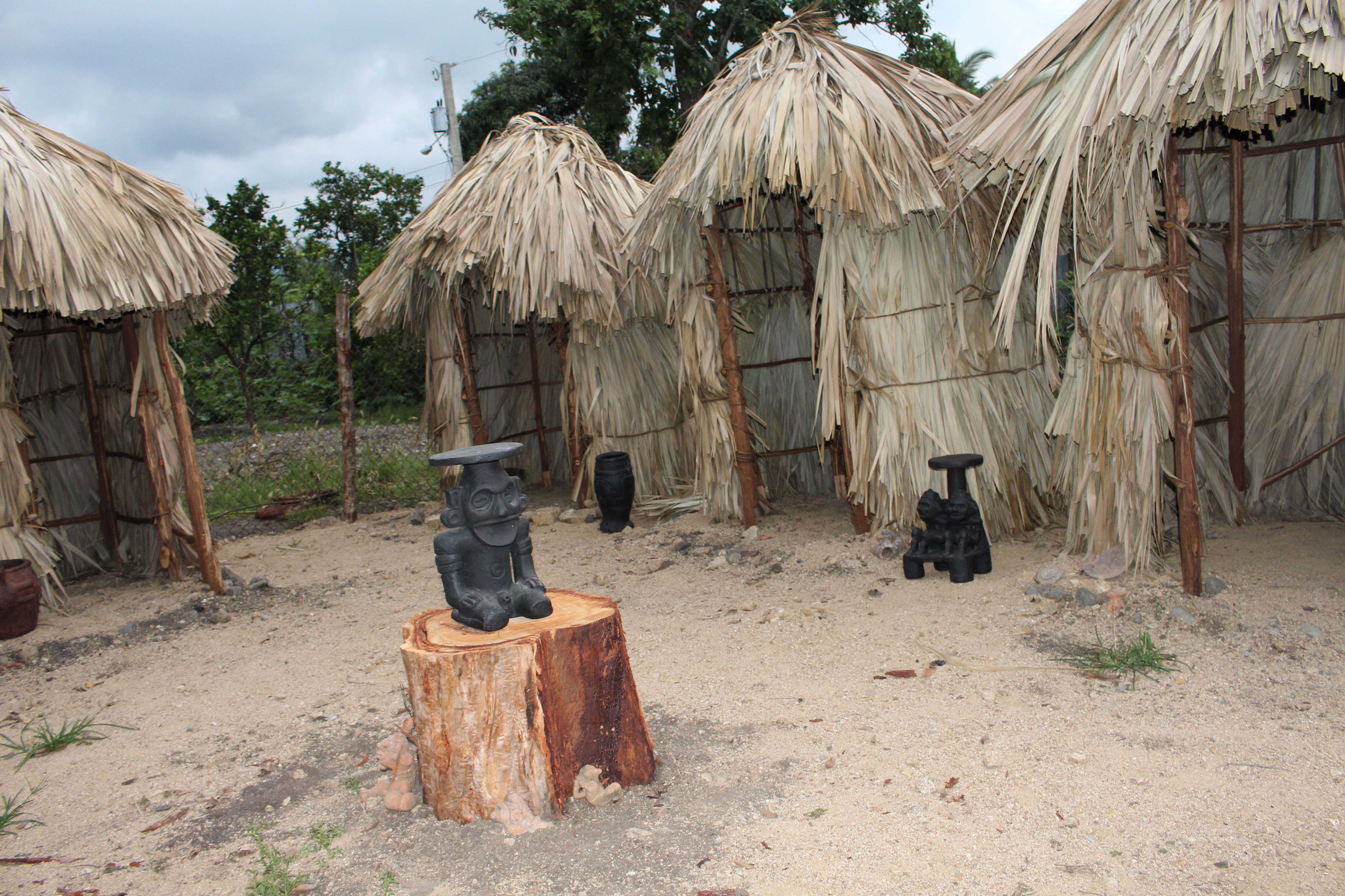 Parte de los atractivos de turismo cultural de la provincia.